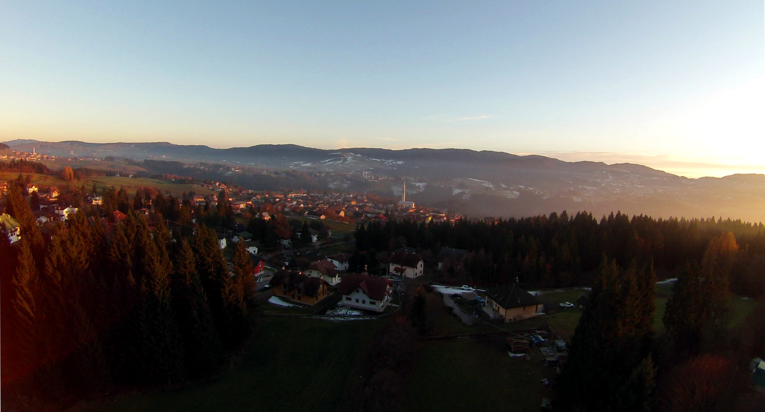 DRONE - Roana dall'alto